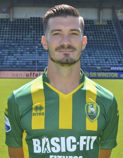 Édouard Duplan